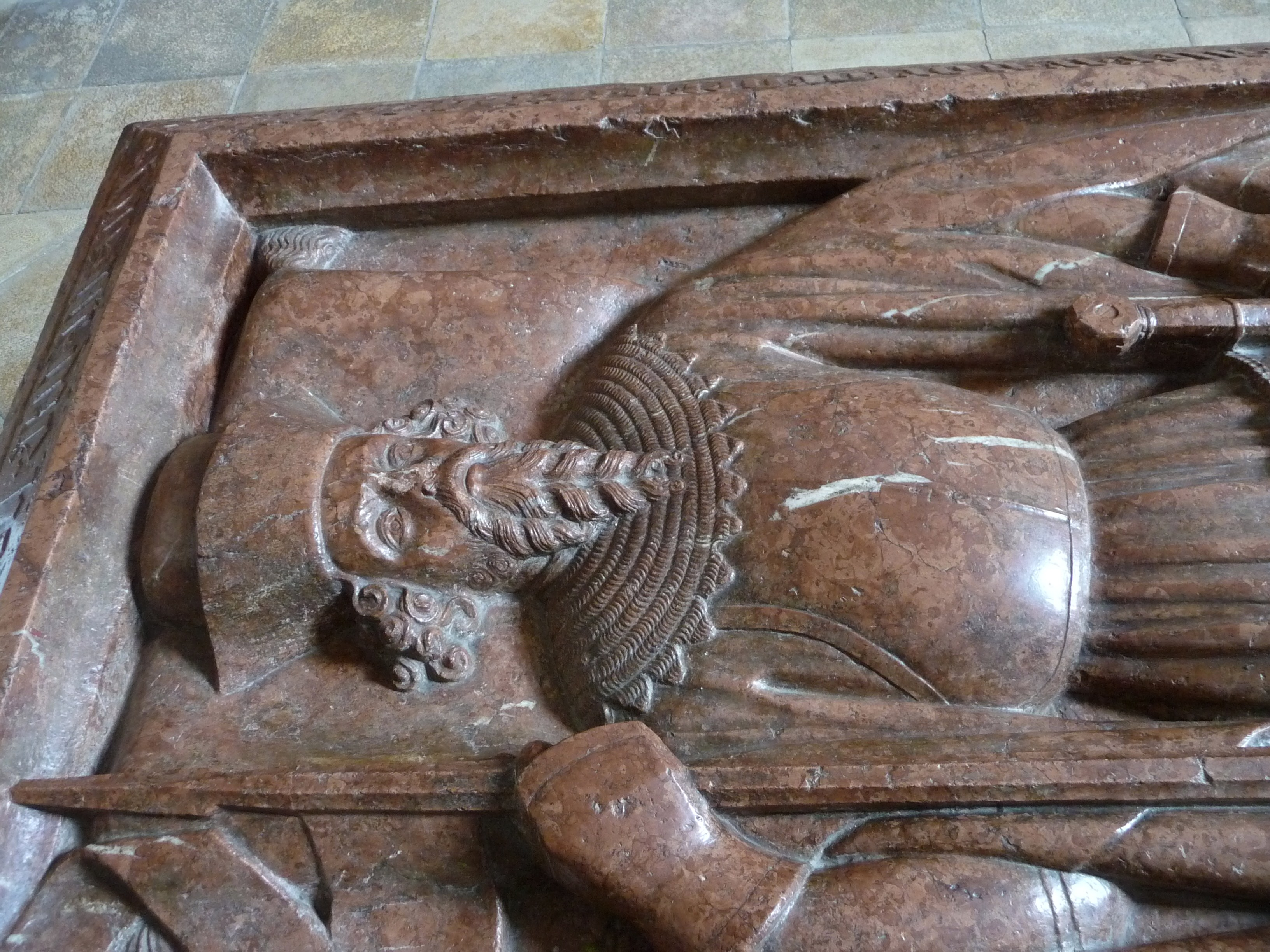 Bildnis des Grafen Heinrich IV. von Ortenburg auf der Deckplatte der Tumba in der Ortenburgkapelle am Passauer Dom